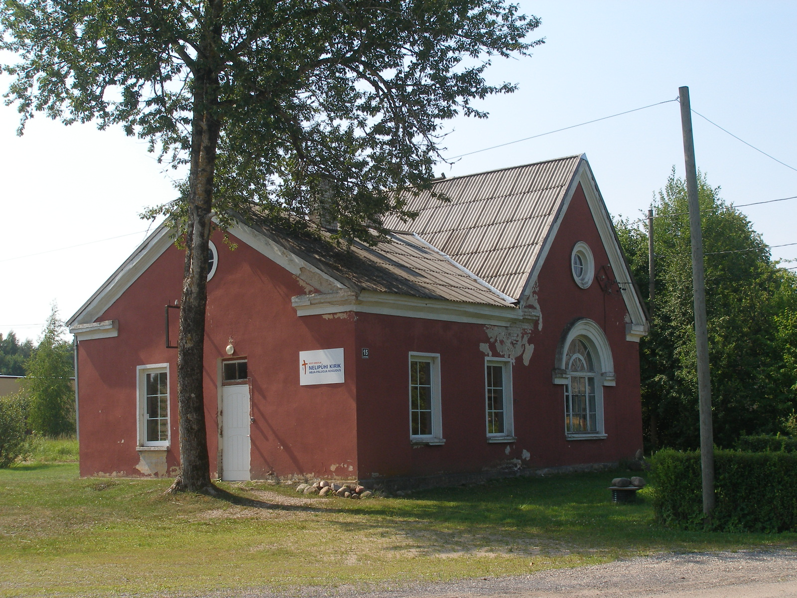 Abjas stacija